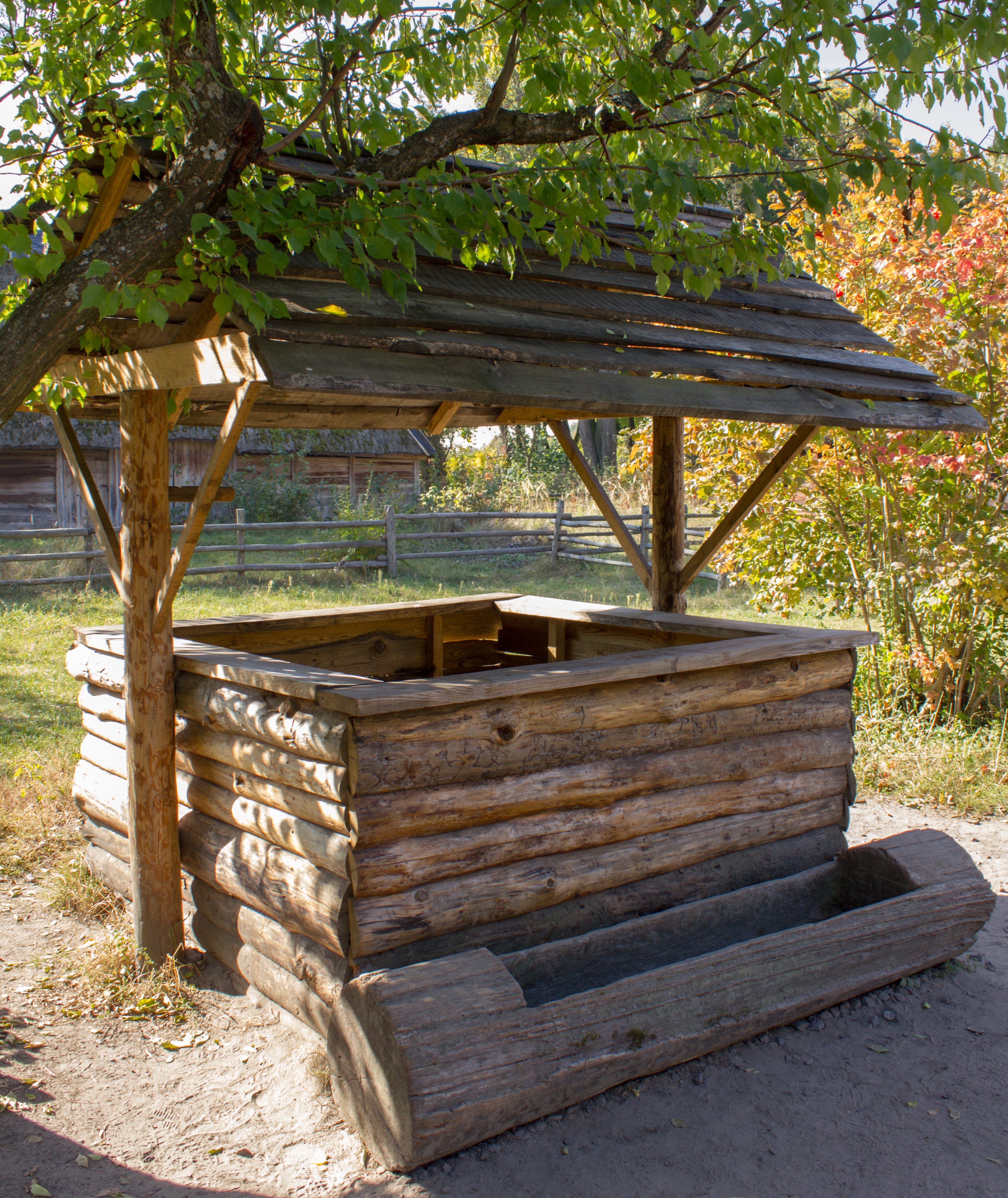 Садиба з села Яснозір'я (2) Черкаського району Черкаської області, Київ, Пирогів